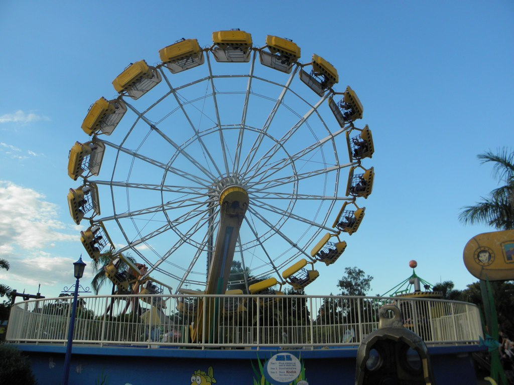 Reef Diver Enterprise ride at Dreamworld.